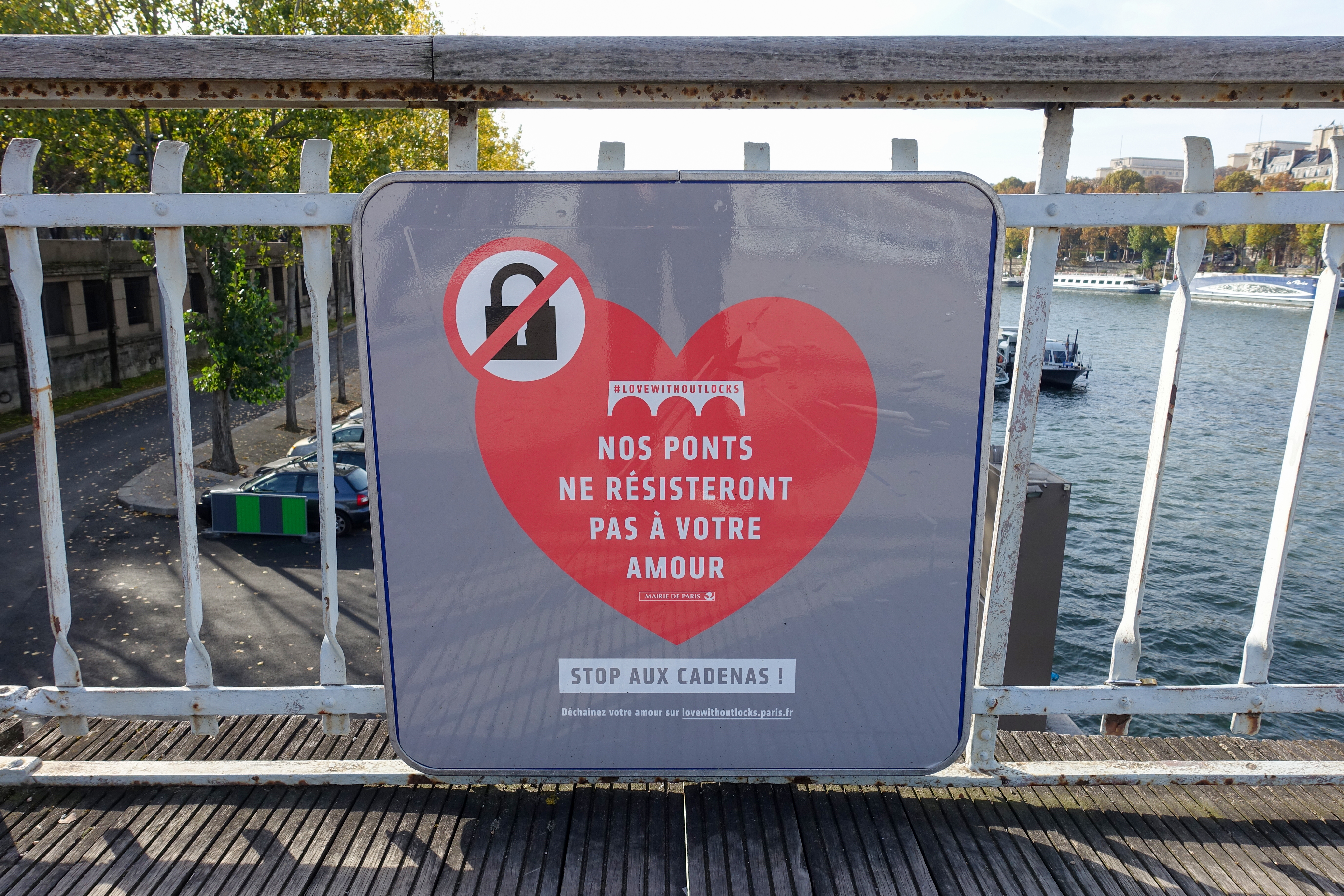 Panneau de la campagne « Stop aux cadenas ! » (#lovewithoutlocks) avec le message « Nos ponts ne résisteront pas à votre amour. Déchaînez votre amour sur » de la Mairie de Paris, posé sur la rambarde de la passerelle Débilly, Paris, France.